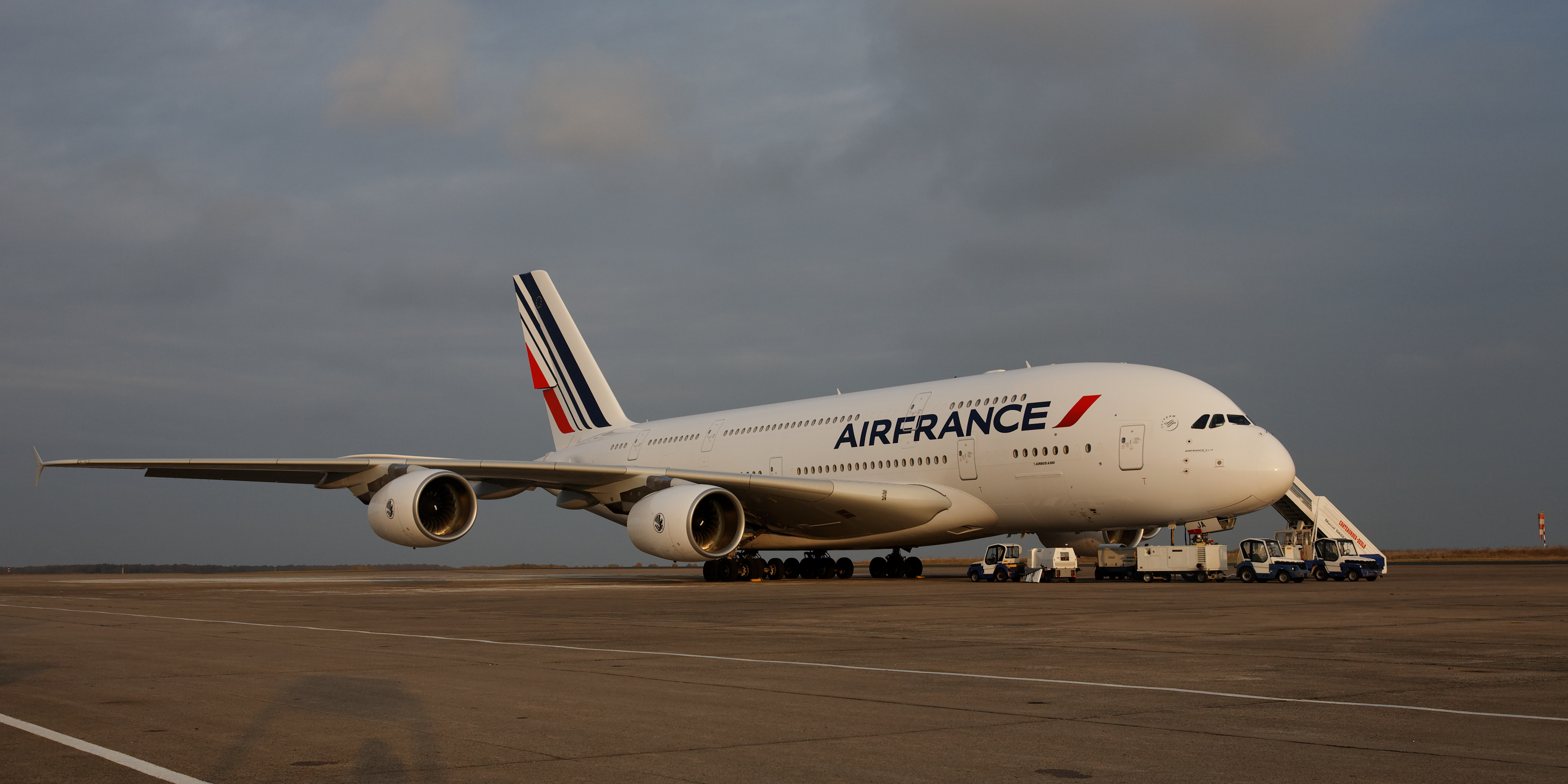 1er Airbus A380 Air France